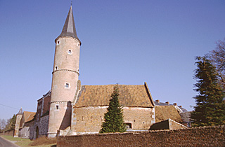 Chateau de Waleffe